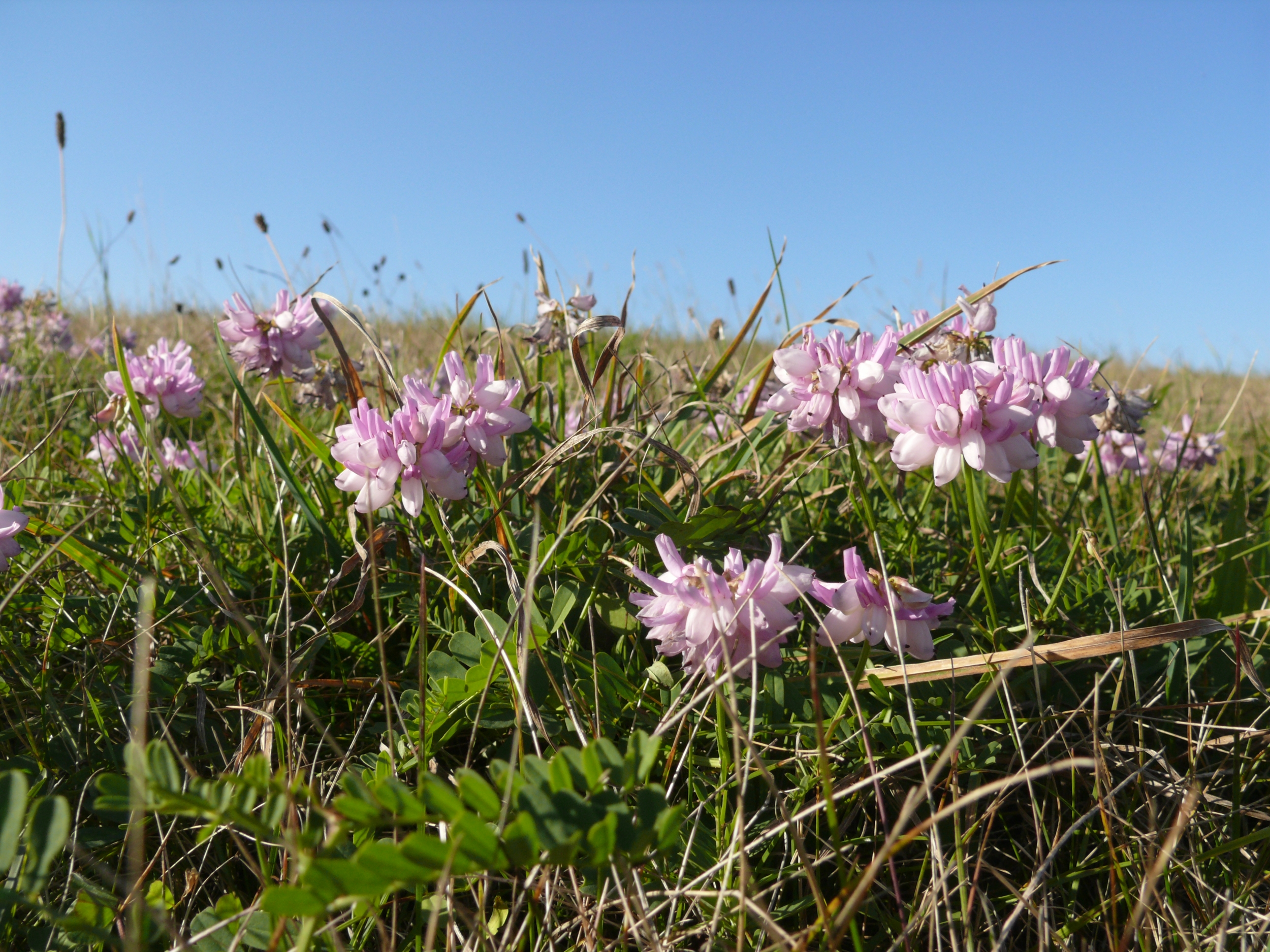 Securigera varia, Tauberland, Germany